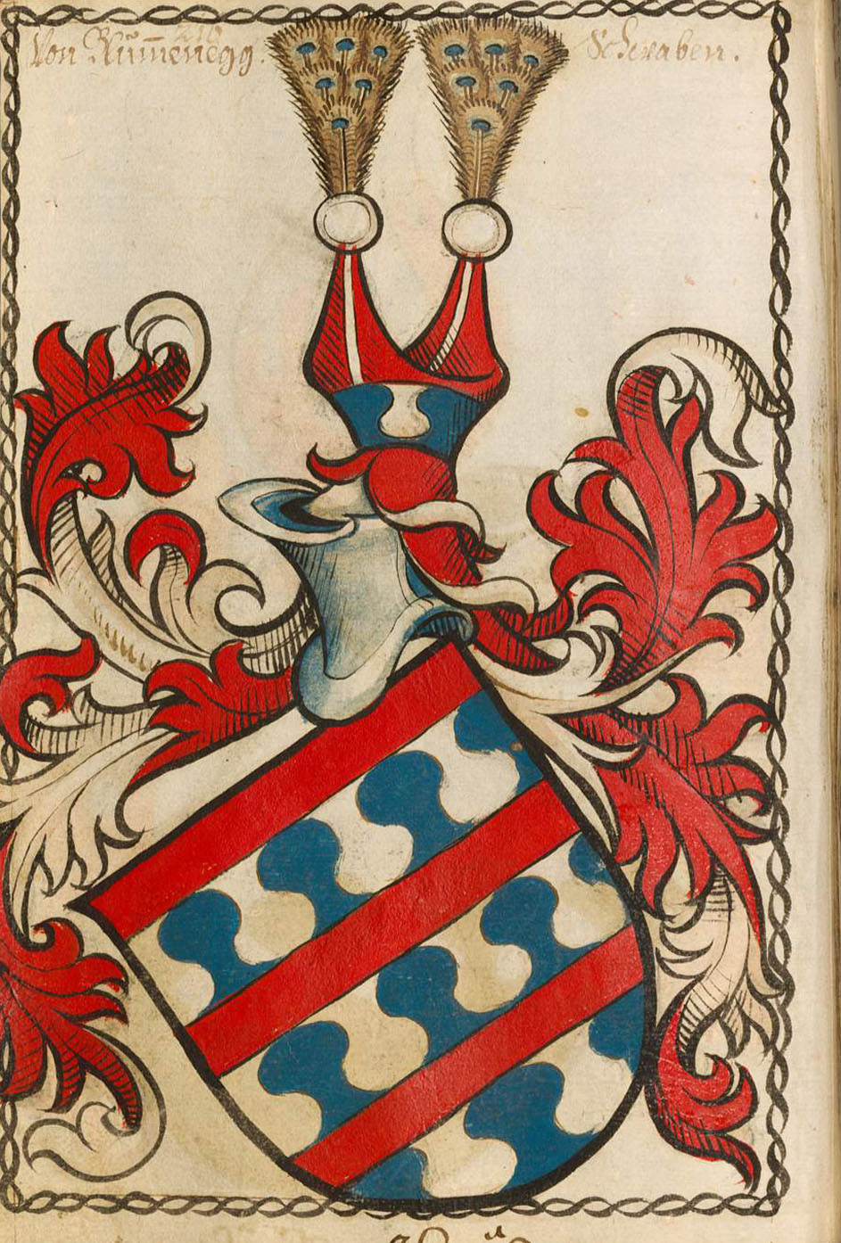 Scheibler'sches Wappenbuch, älterer Teil Blumenegg